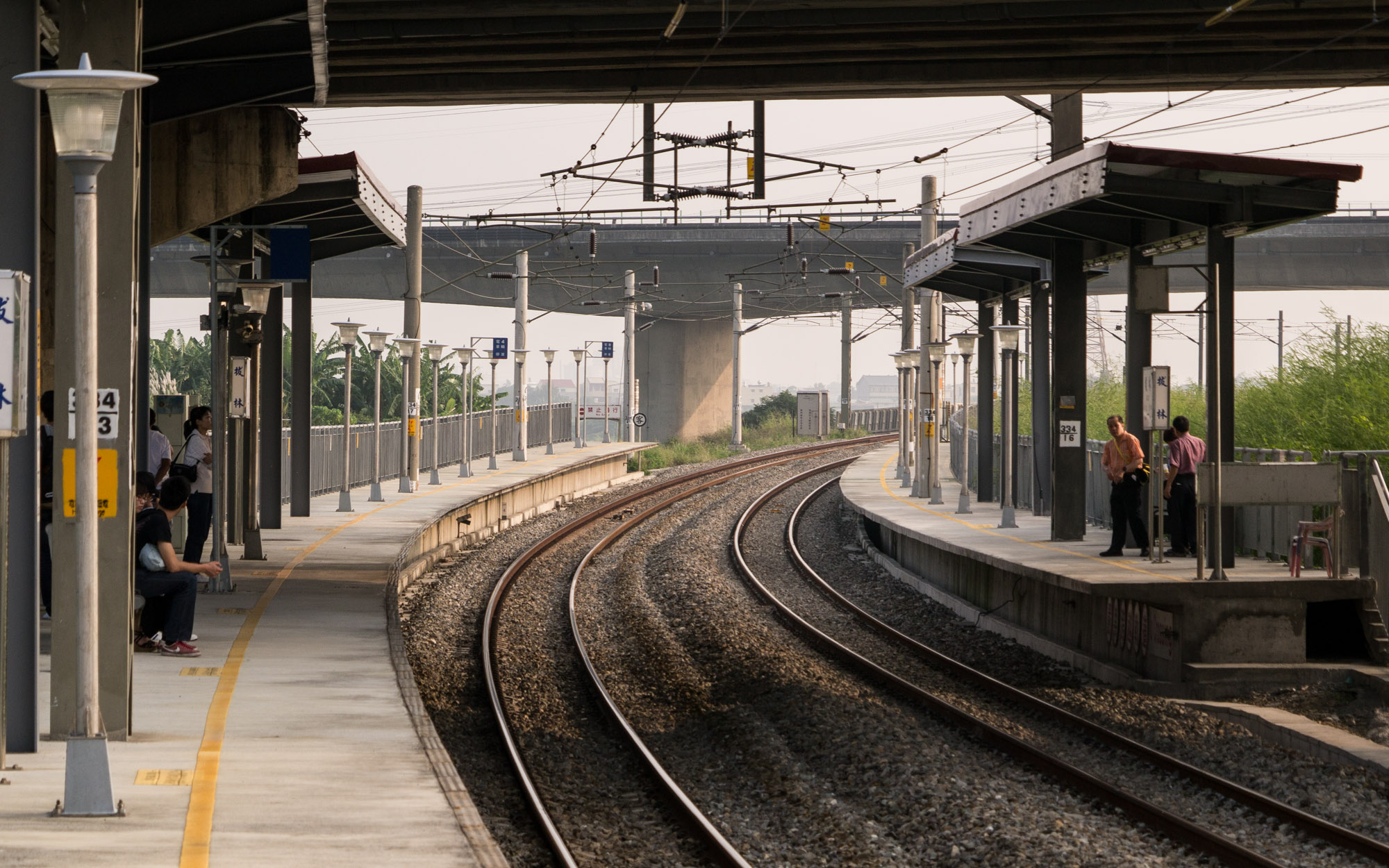 拔林車站